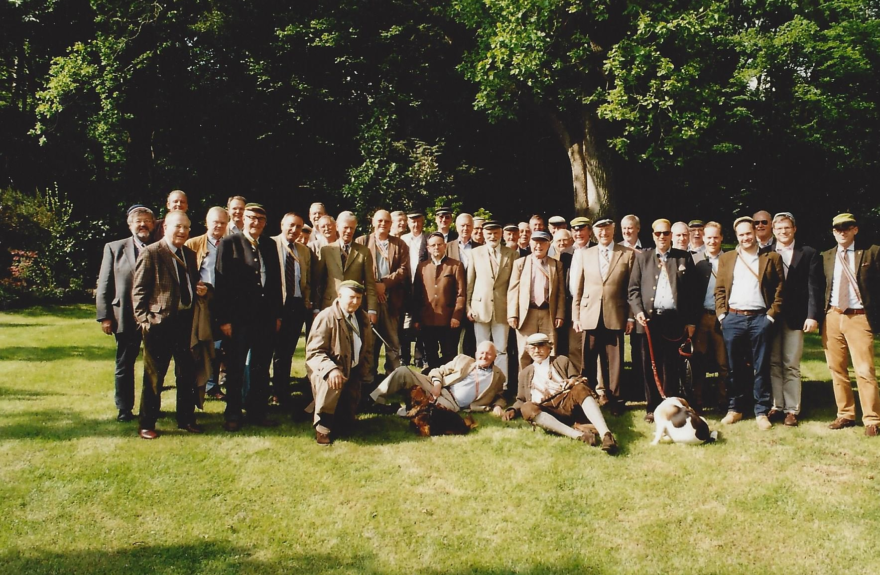 Mitglieder des Academischen Clubs zu Hamburg bei einem Ausflug in der Nordheide